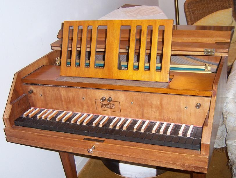 Clavecin de marque Neupert datant des années 1950